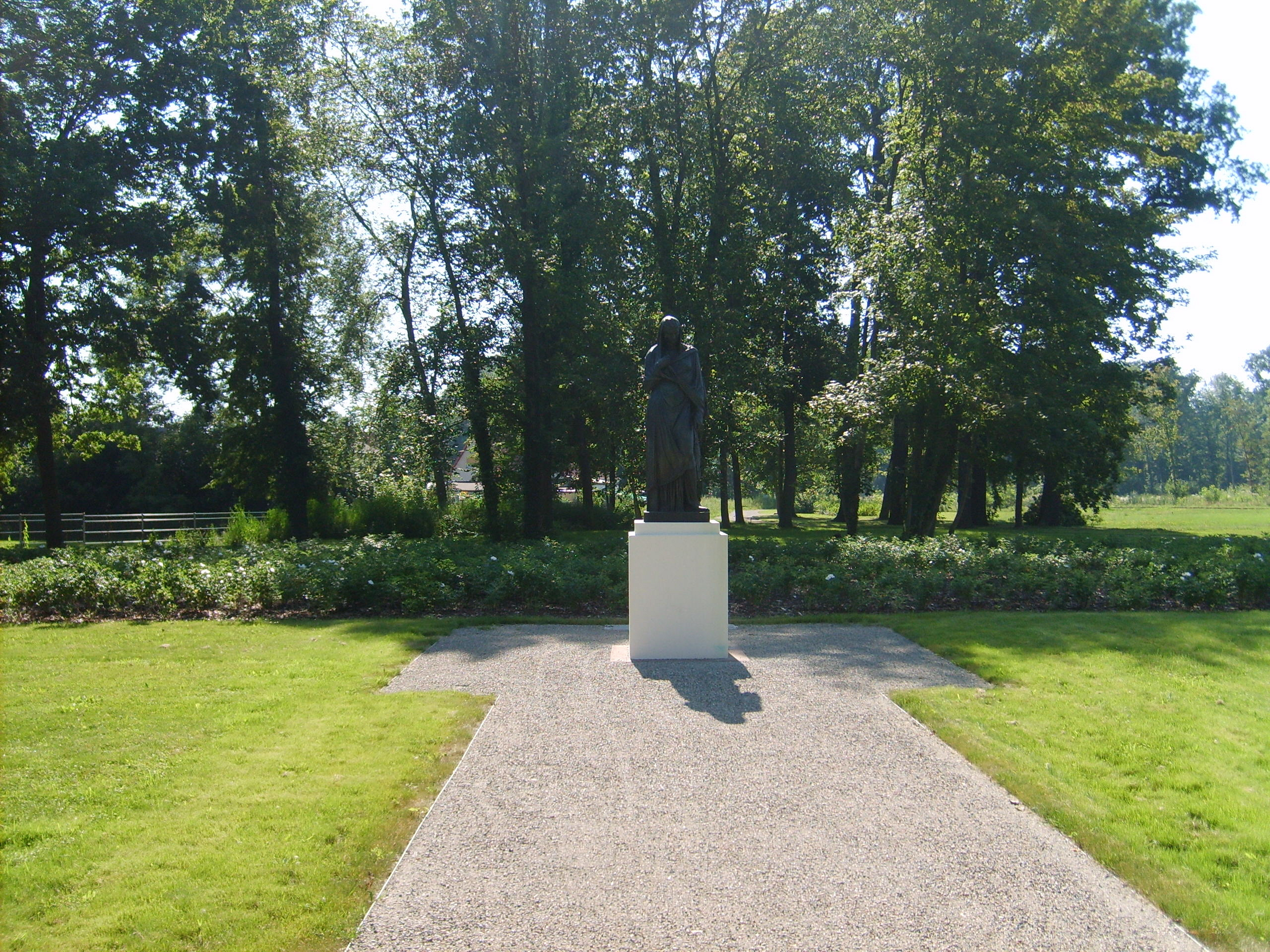 Schlosspark Lauchhammer-West mit Kunstguss "Frau von Herkulaneum"